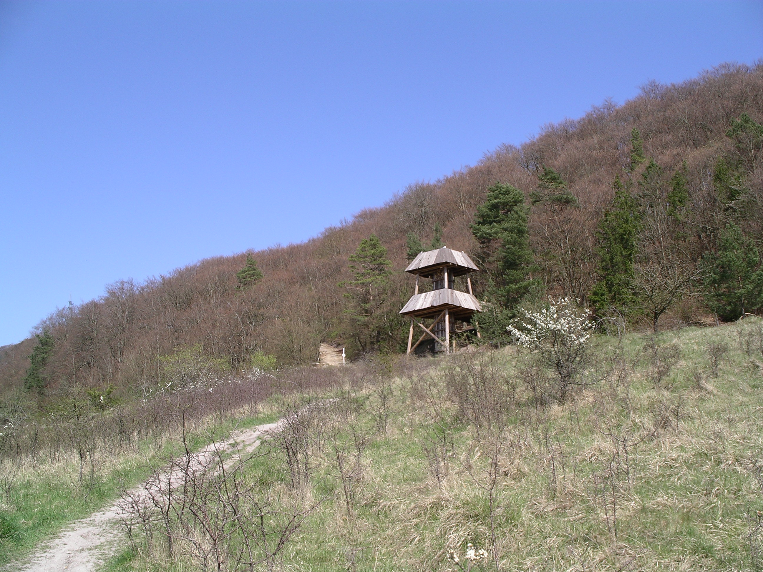 Naturschutzgebiet "Sonnebierg" in Walferdange/Helmsange (Gemeinde Walferdingen, Ortsteil Helsmingen), in Luxemburg